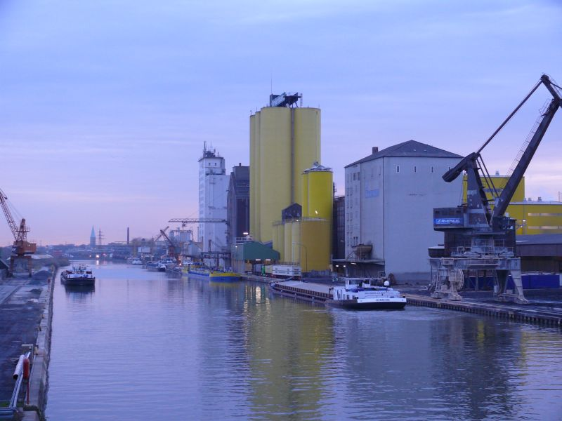 Hafen Hamm, eigenes Bild